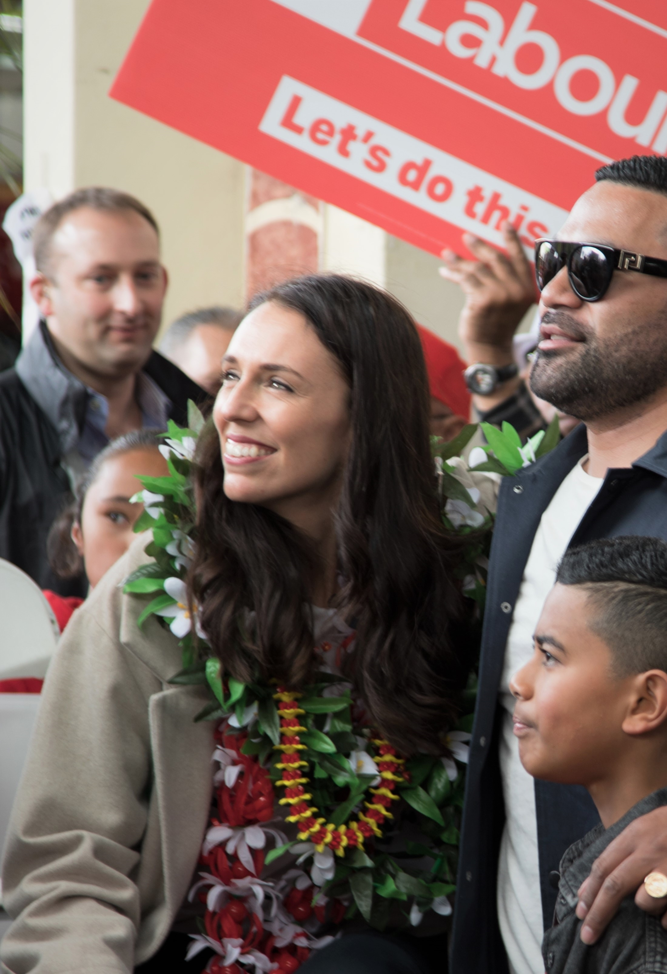 Labour-Pacfic-Launch-19